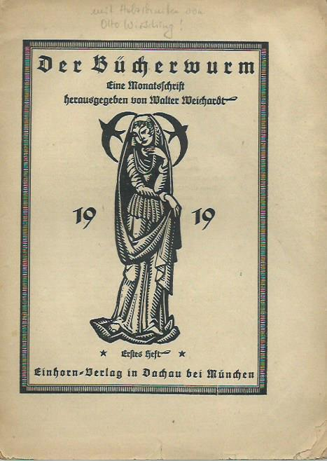 Der Bücherwurm. Eine Monatsschrift. Jahrgang 1, Heft 1, 1919. Alle Holzschnitte und Zeichnungen dieses Hefts sind von Otto Wirsching